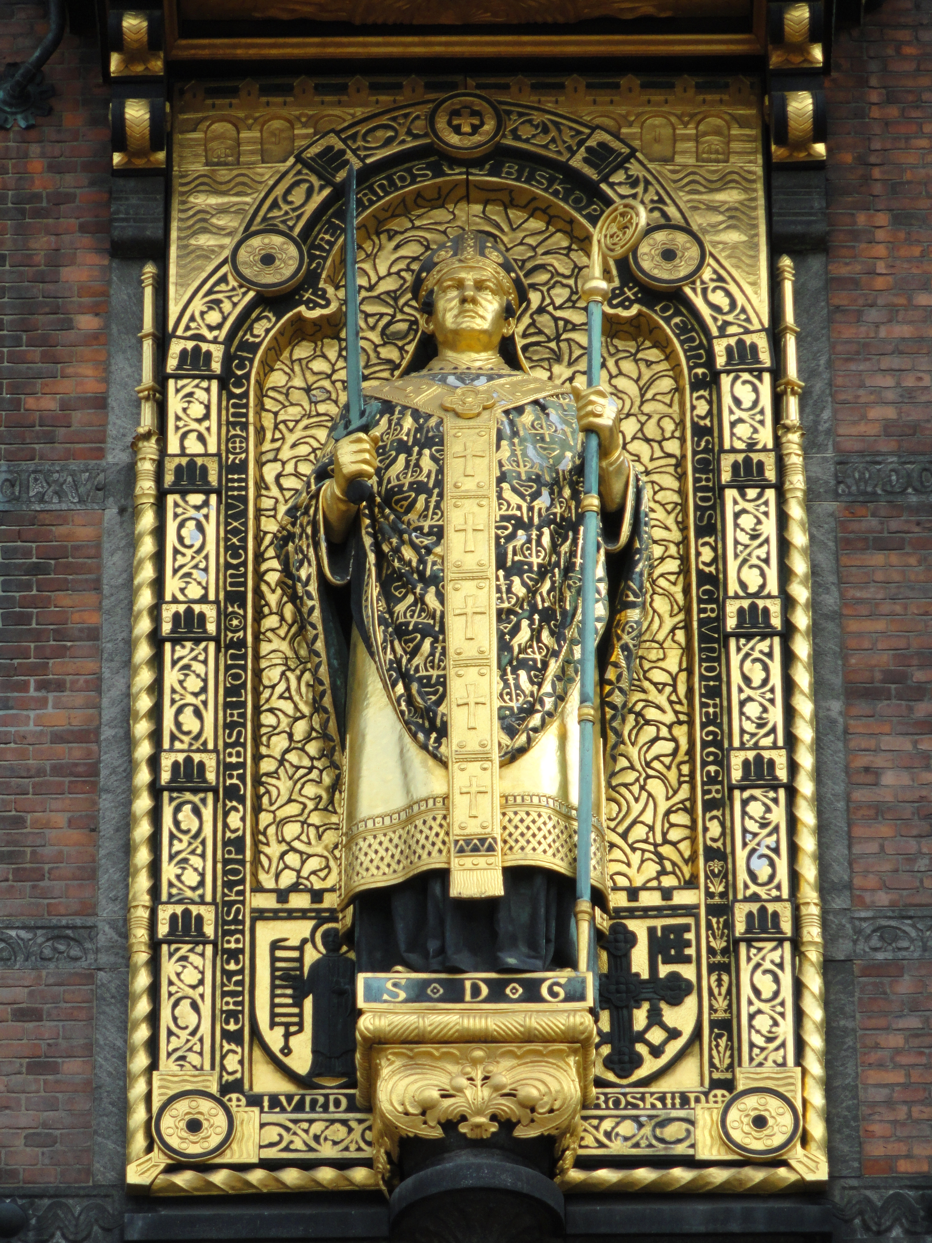 Detail of Town Hall (Københavns Rådhus), Copenhagen, Denmark.